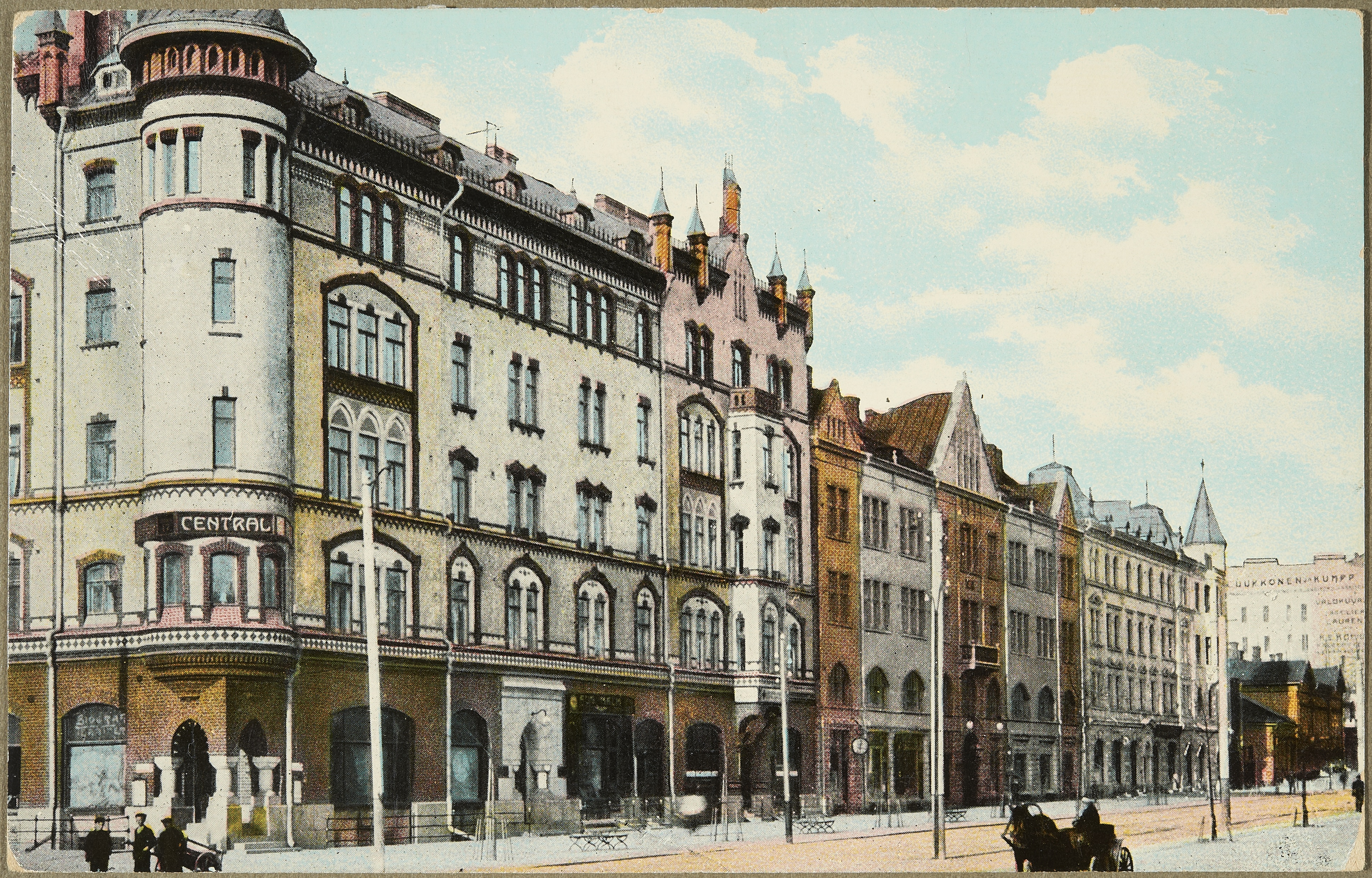 Commerce ja muita jugendtaloja Hämeenkadulla Tampereella. Viimeisenä oikealla Pulla-Helinin talo (nimi tuli leipuri Oskari Helinin konditorialiikkestä). Commercen talossa toimi mm hotelli Central.